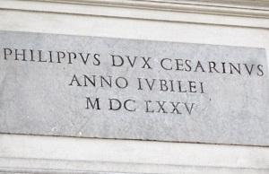 Memoria di Filippo Cesarini (1675) sulla facciata principale della collegiata di S. Maria Maggiore a Lanuvio, RM. Segnalato da Sandro Vallocchia.